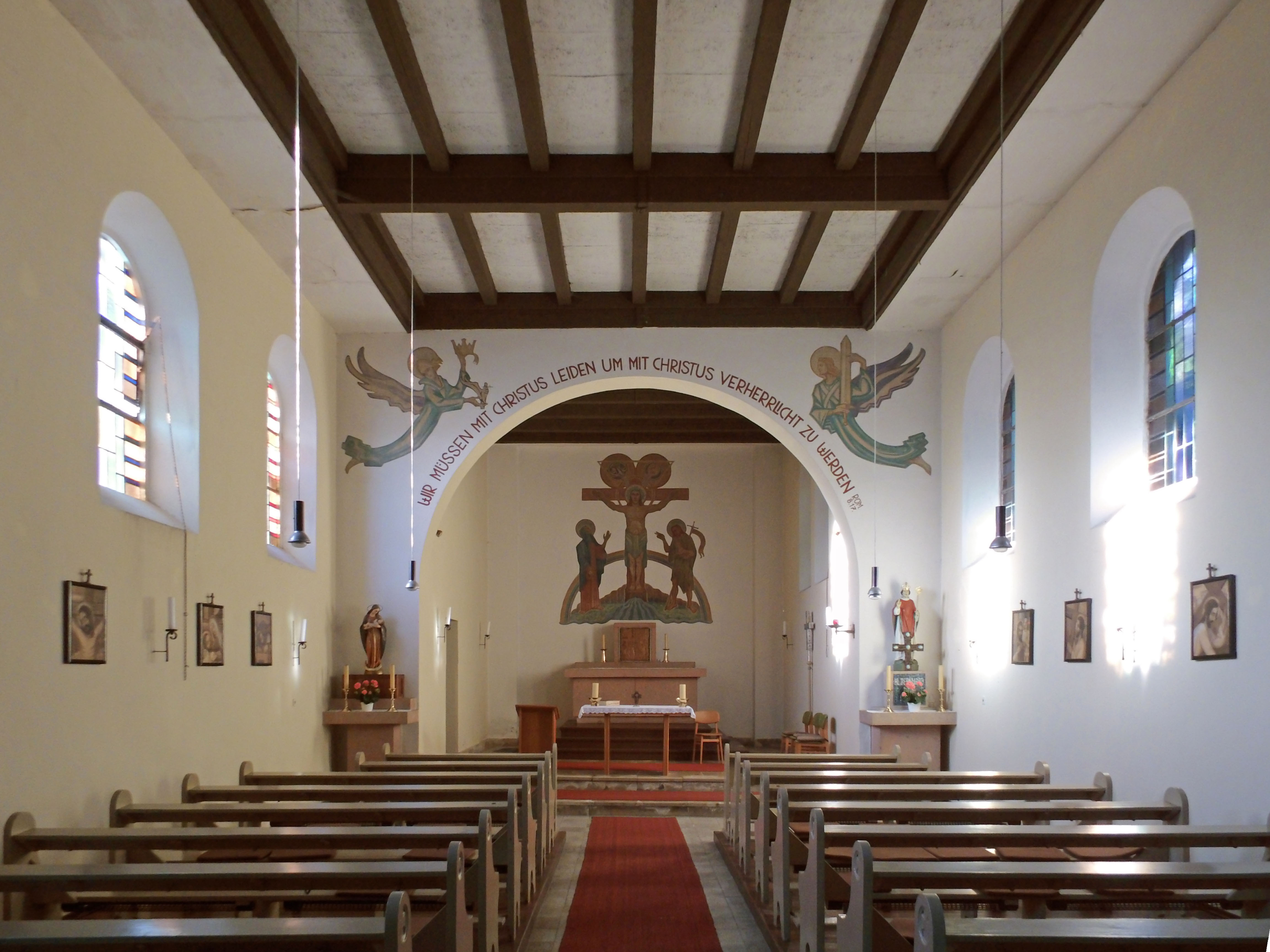 Katholische St.-Bernward-Kirche in Sommerschrnburg, Blick zum Altarraum.